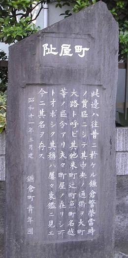 史跡碑 「町屋址」 （神奈川県鎌倉市）